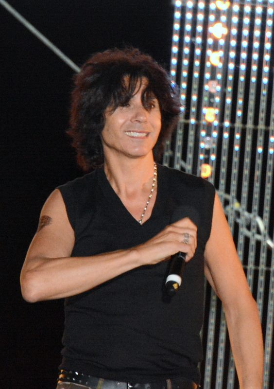 Jean-Luc Lahaye au concert "La Folie des années 80" à Enghien-les-Bains